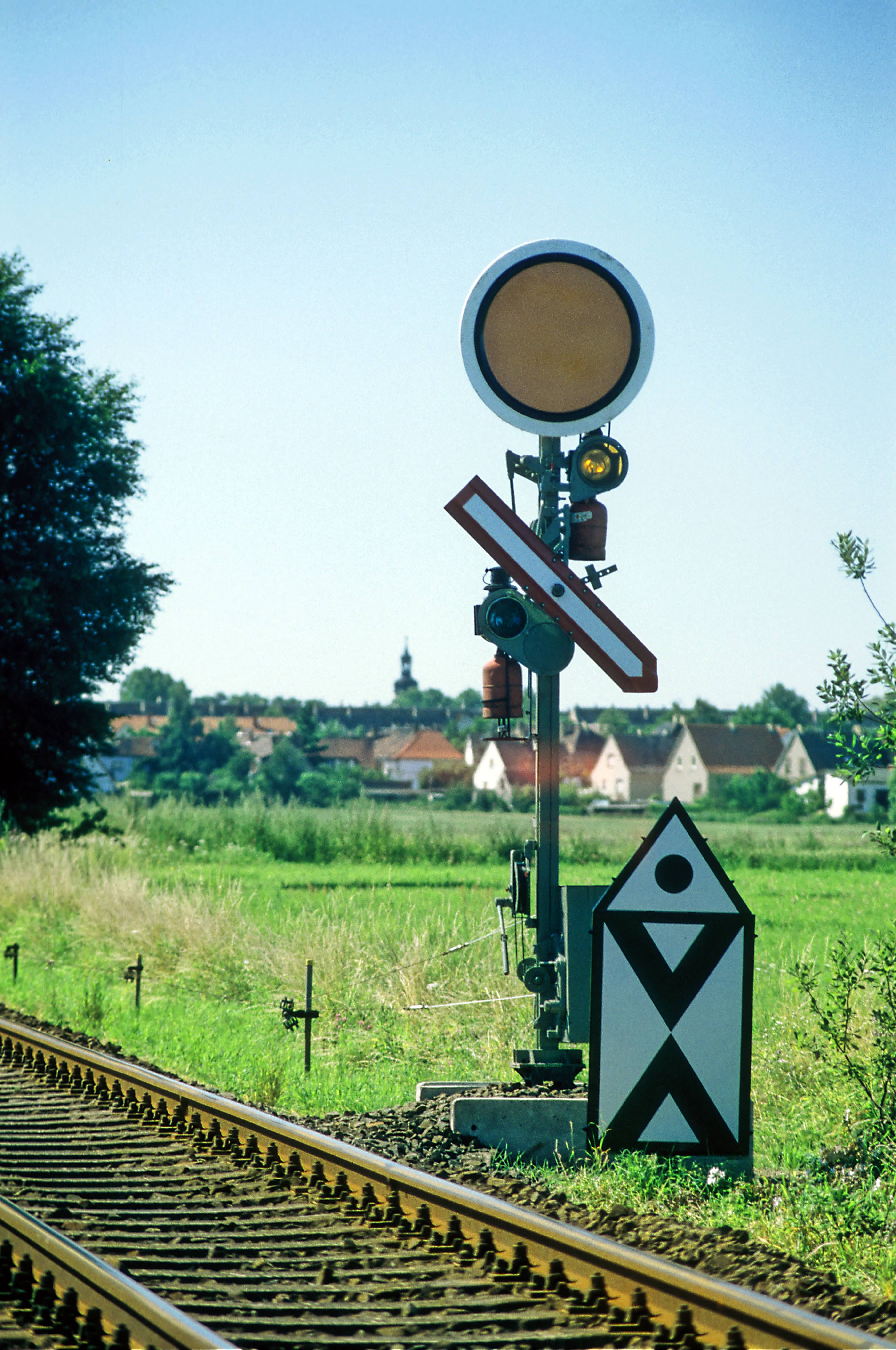 »Fahrt mit Geschwindigkeitsbeschränkung erwarten«, im DR-Netz befindet sich beim Nachtzeichen die grüne Laterne unten. Weil dieses Signal kein Vf 1, »Fahrt frei erwarten« zeigen konnte, war zusätzlich zur Scheibe auch der obere Blendenrahmen unbeweglich.